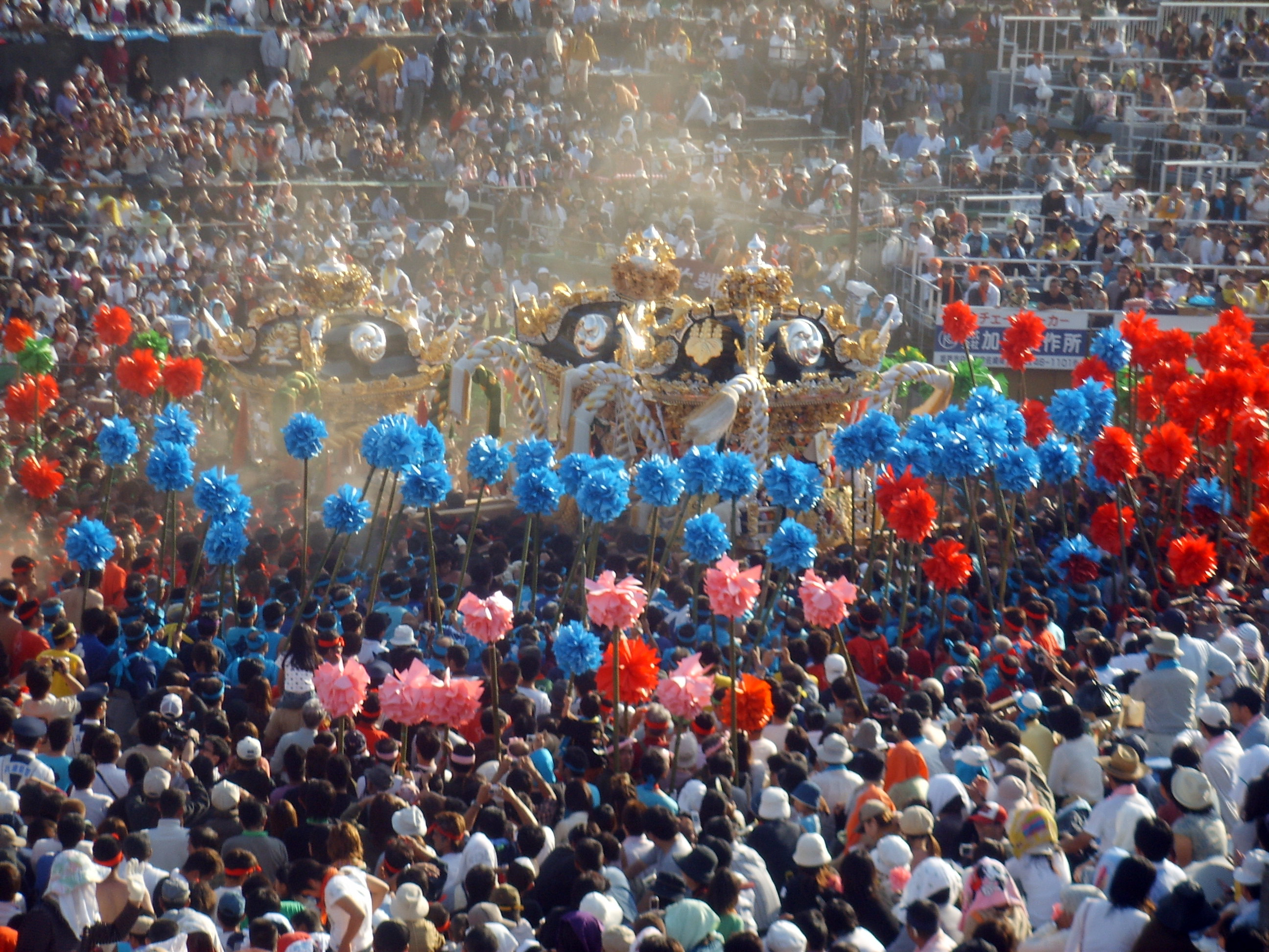 Nada no Kenka matsuri , himeji01